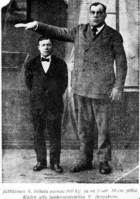 Kuva, jossa Väinö Kustaa Siltala ja telinevoimistelija V. Bergström, Väinön käden alla.